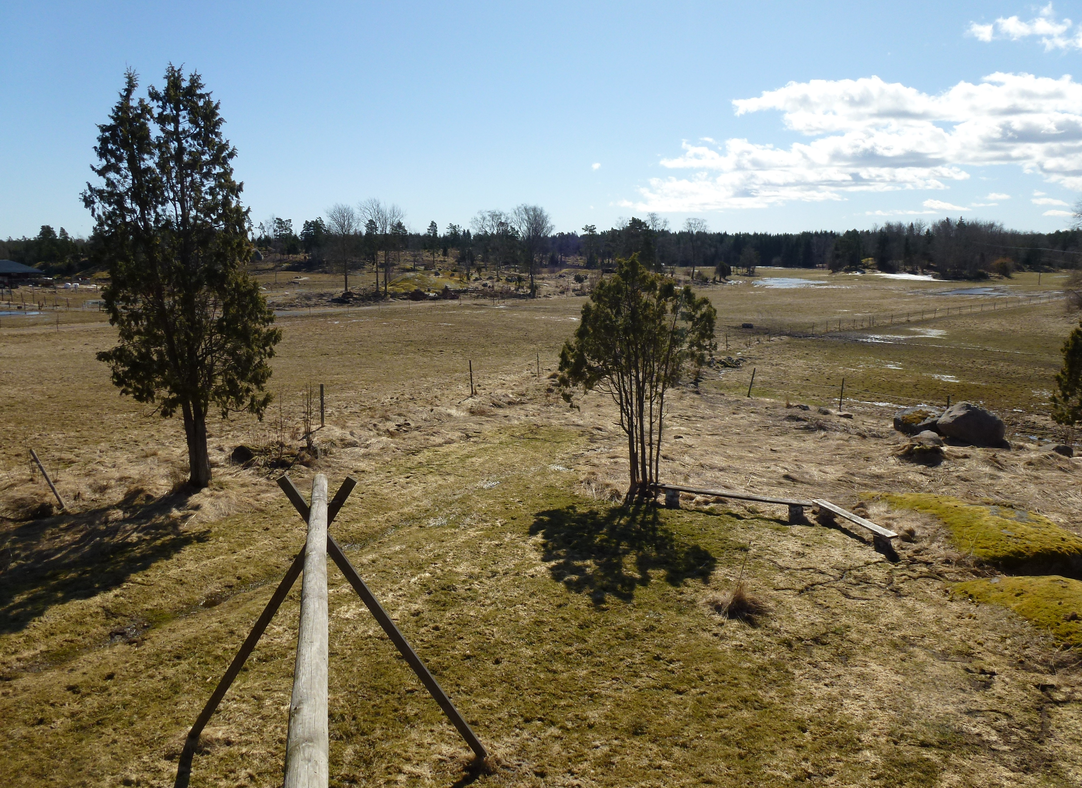 Kulturlandskapet på Väddö vid Marum väderkvarn